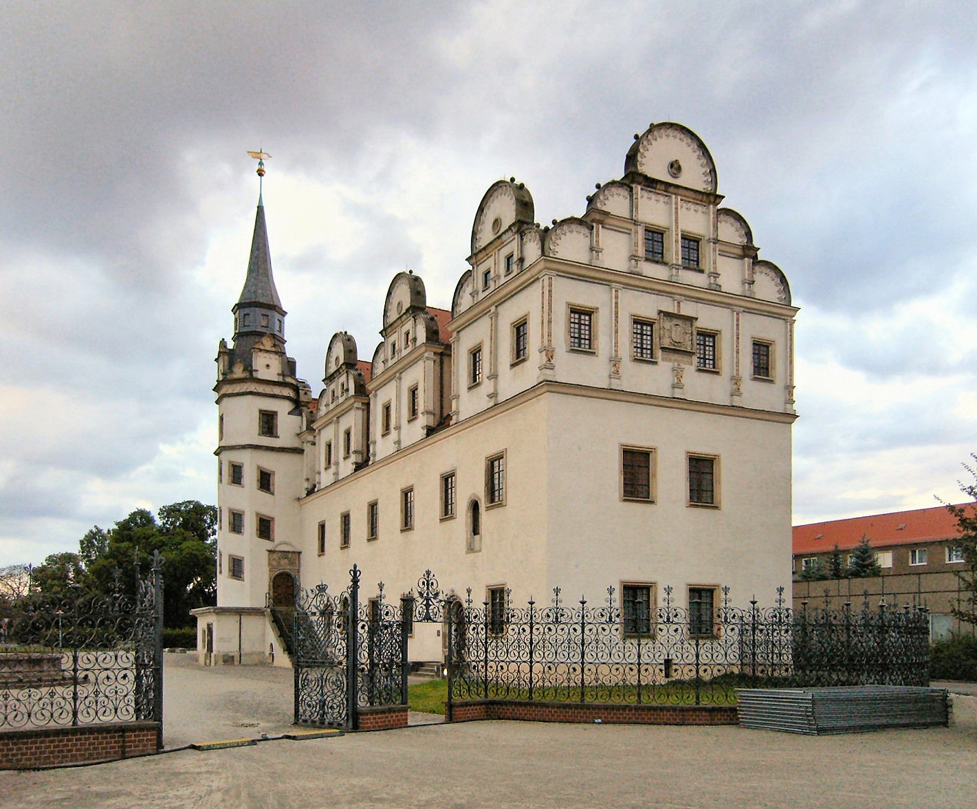 Johannbau (Stadtschloss)